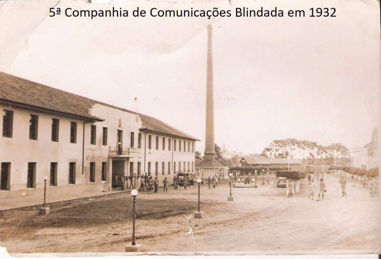 Fachada da Cia em 1932